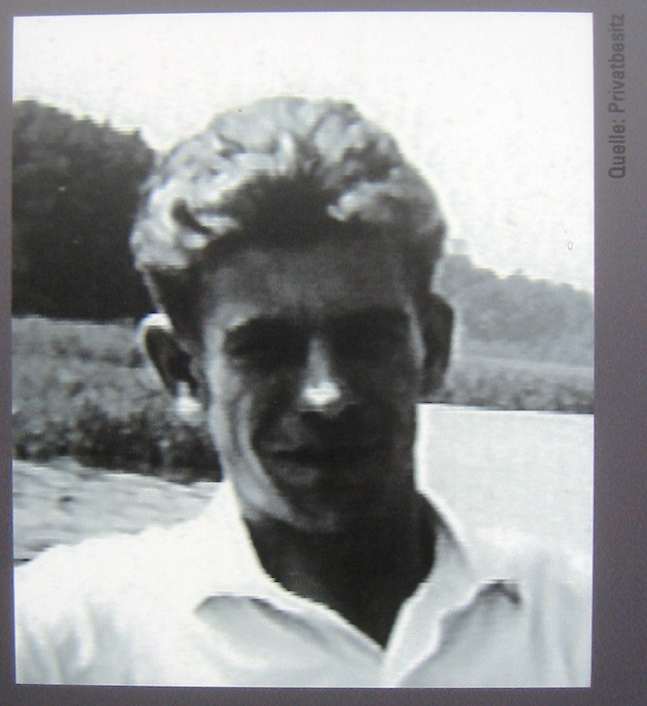 Maueropfer Helmut Kliem, aufgenommen auf einer frei zugänglichen Informationssäule am Finkenkruger Weg zwischen Berlin-Staaken und Brandenburg.